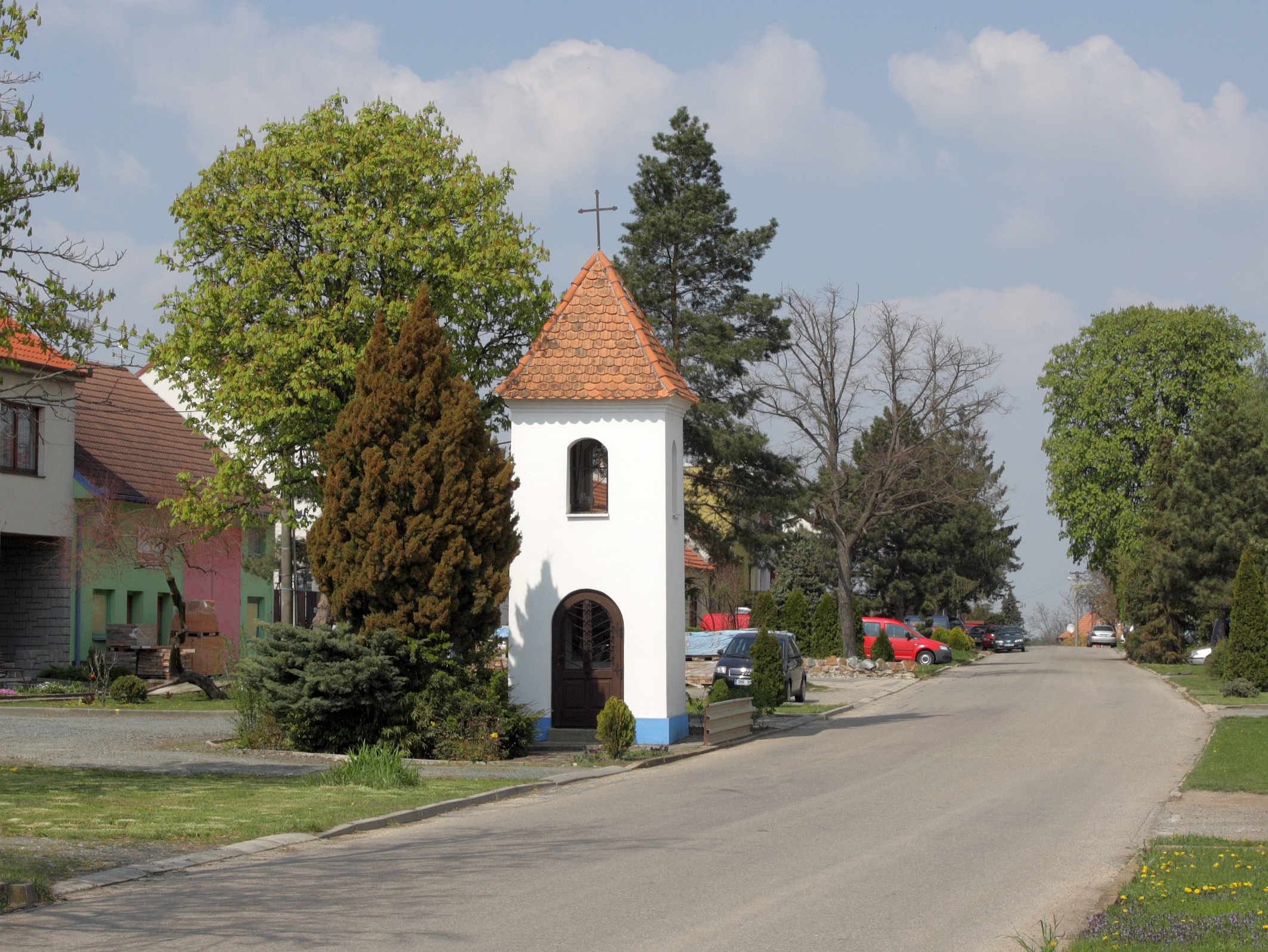 Nesvačilka - zvonice na návsi.